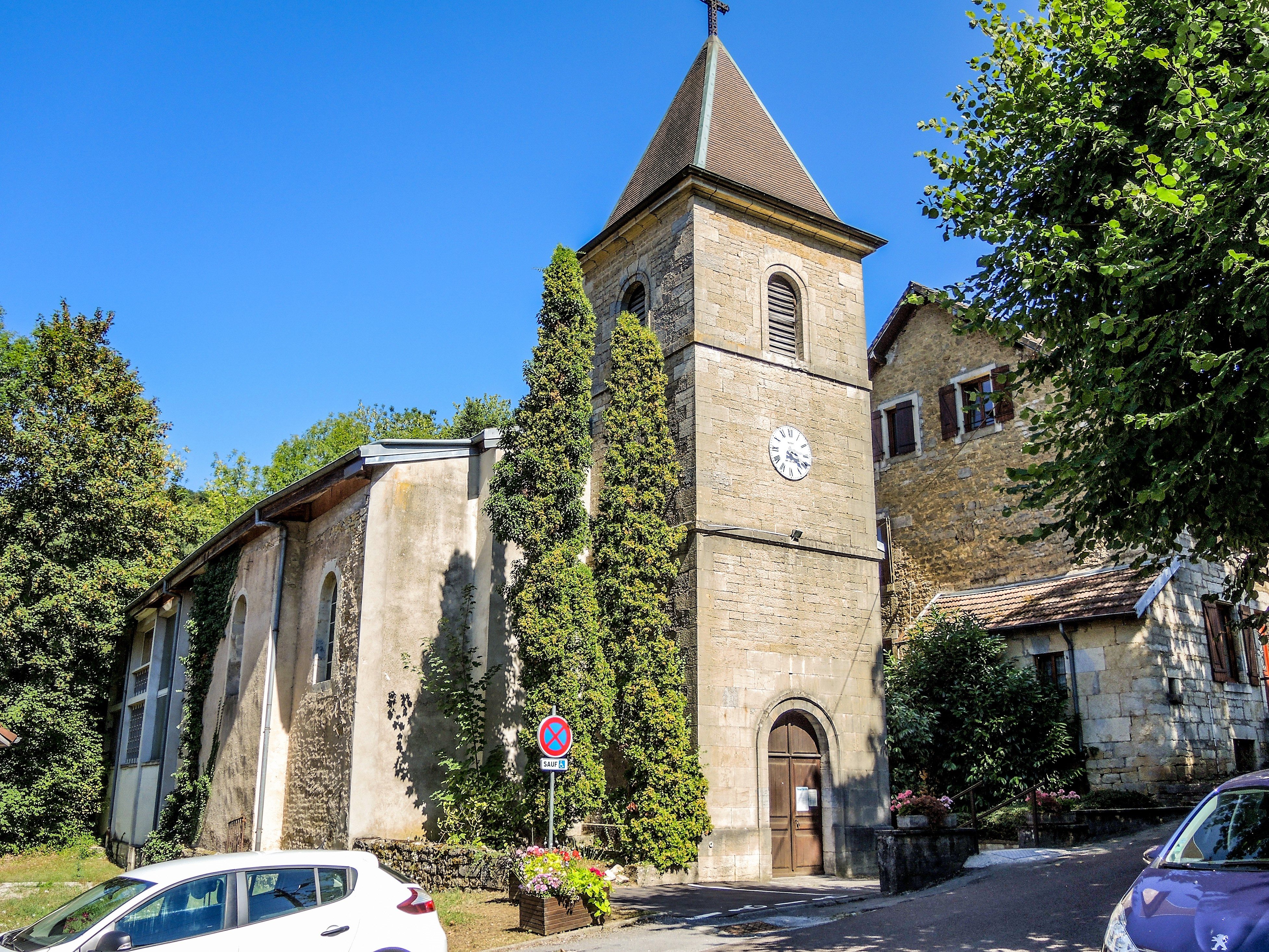 Eglise Saint-Fort. Morre. Doubs